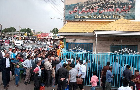 تۆرکجه: گاموش گؤلو قاپیسیندا ایچری گیرمگی گؤزلَیَن آداملار